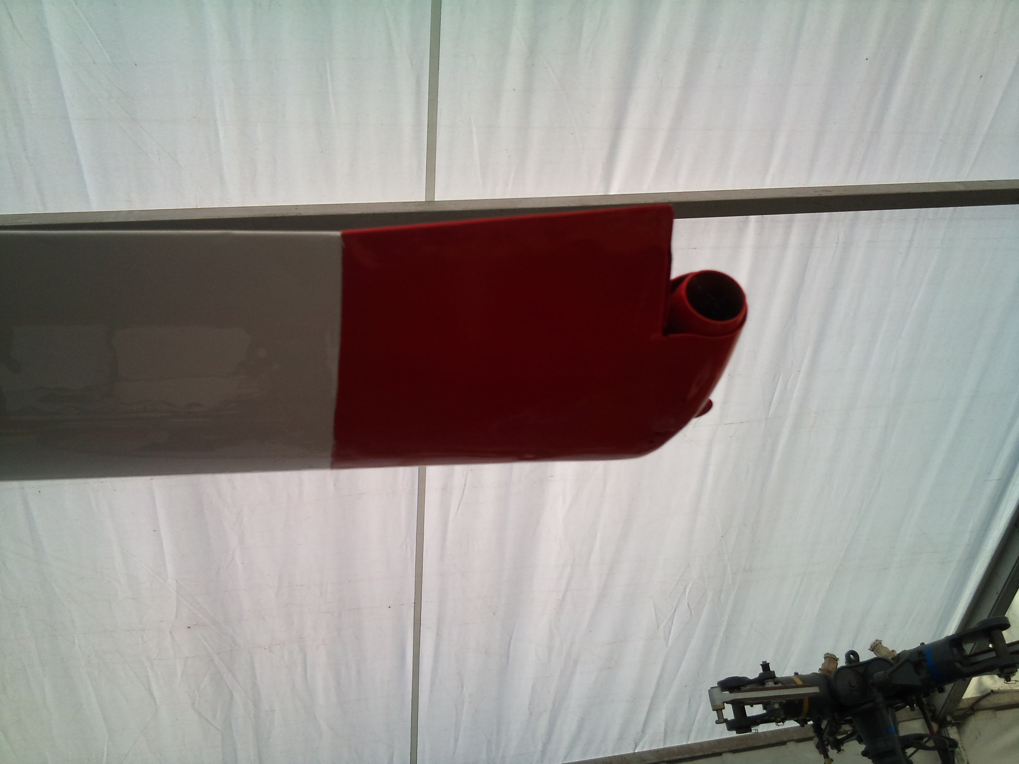 Tuyère d'éjection des gaz en bout de pale d'un Djinn.